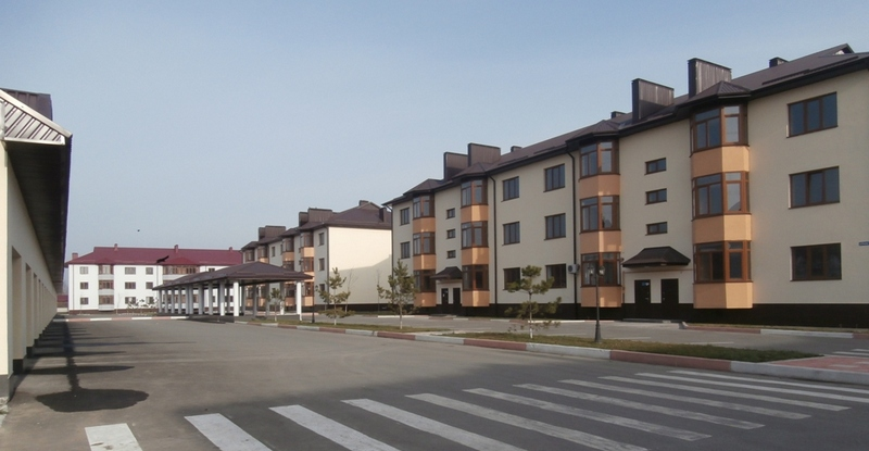 Новостройки в городе Терек Адыгэбзэ: Тэрч къалэ и унэщIэхэр